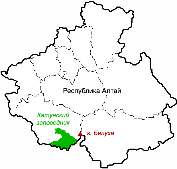 Расположение Катунского заповедника в Республике Алтай